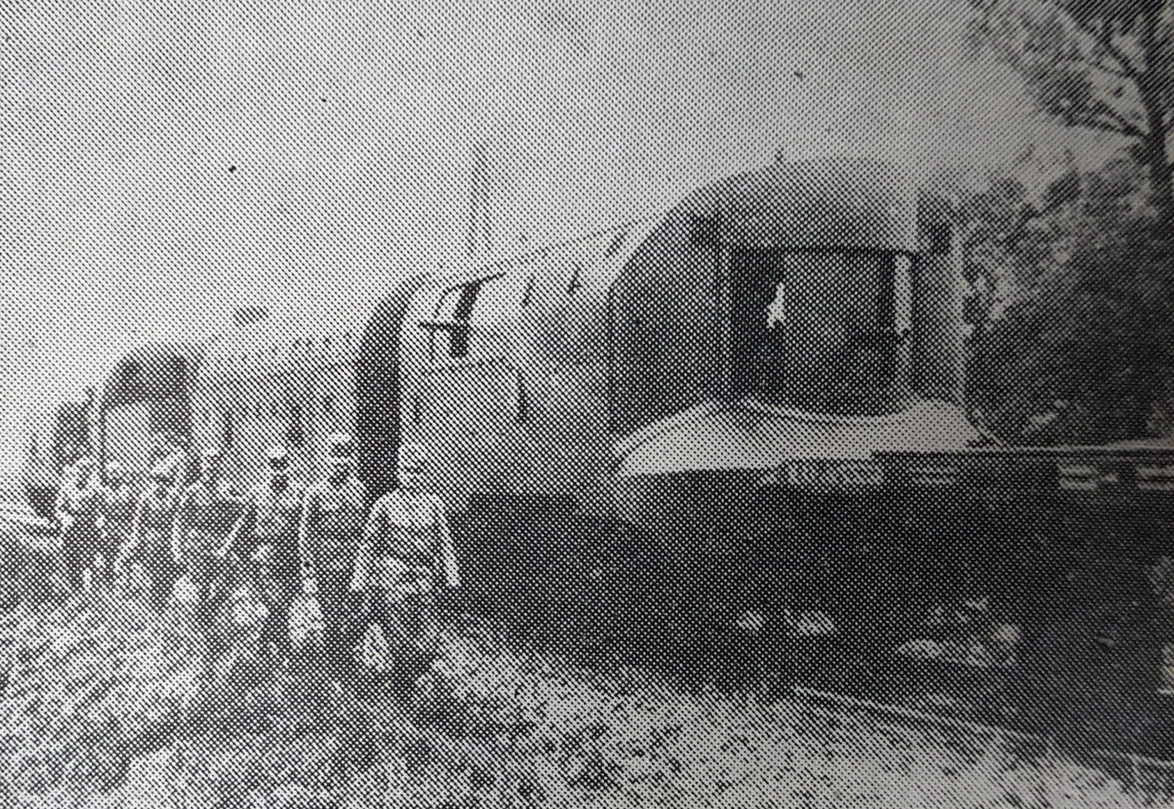 1916 - Tren blindat austro-ungar pe frontul din Transilvania